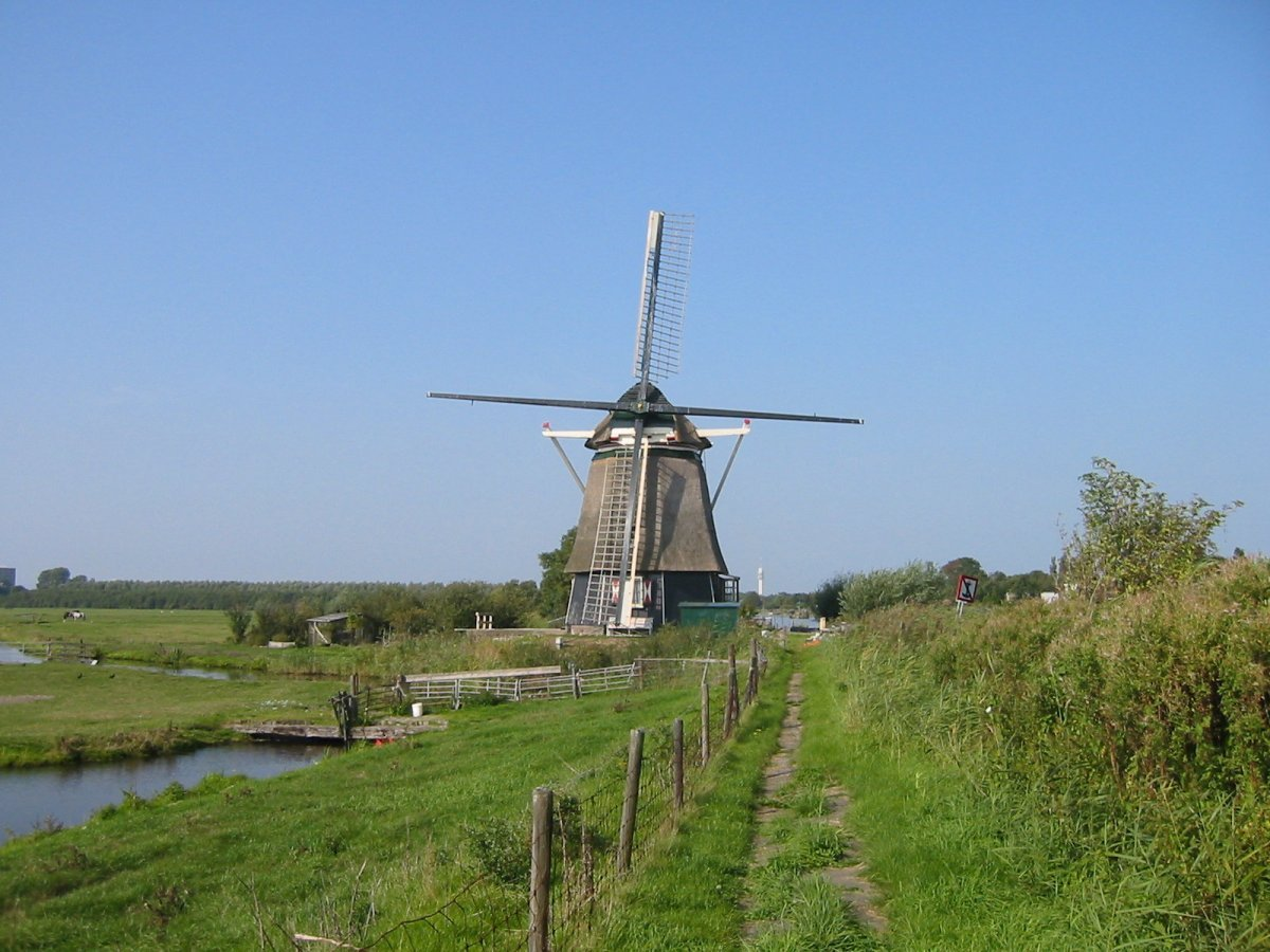 De Vijfhuizer Molen/ Ten-Bruggencatenummer: 01776: Achtkante grondzeiler met één kale roede van voren gefotografeerd (opmerking: Foto gemaakt in het kader van het project Actualisering Monumentenregister (AMR).)